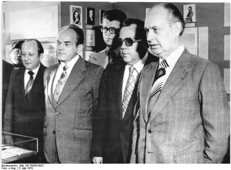 ADN-ZB 3.5.1978 Trier: Eine Delegation der SED unter Leitung von Kurt Tiedtke, Mitglied des ZK der SED (r.), ehrte am 3.5. im Geburtshaus von Karl Marx in Trier das Leben und Werk des Begründers des Wissenschaftlichen Sozialismus. In Anwesenheit des Leiters der Ständigen Vertretung der DDR in der BRD, Botschafter Dr. Michael Kohl (2.v.r.), legte sie ein Blumengebinde an der Büste von Karl Marx nieder.